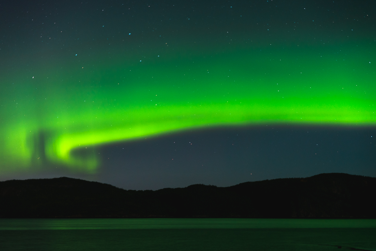 Aurore boréale en vue au Saguenay−Lac-Saint-Jean, Québec, Canada.